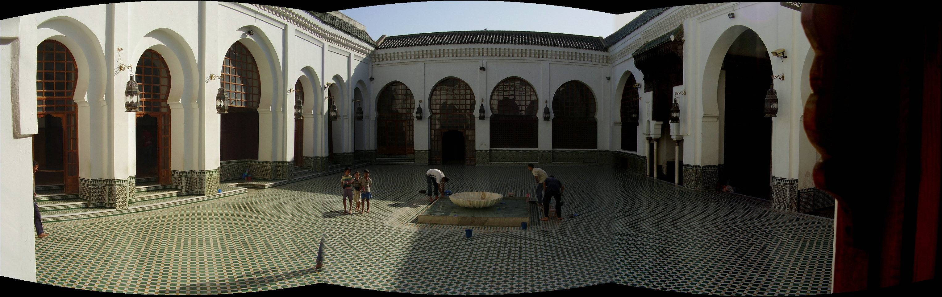 Andalusian Mosque, Fes, Morocco